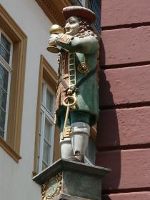 Foto von der Perkeo-Statue in Heidelberg. Christian Bienia. Das Foto darf unter den Bedingungen der GNU Free Document License verwendet werden.